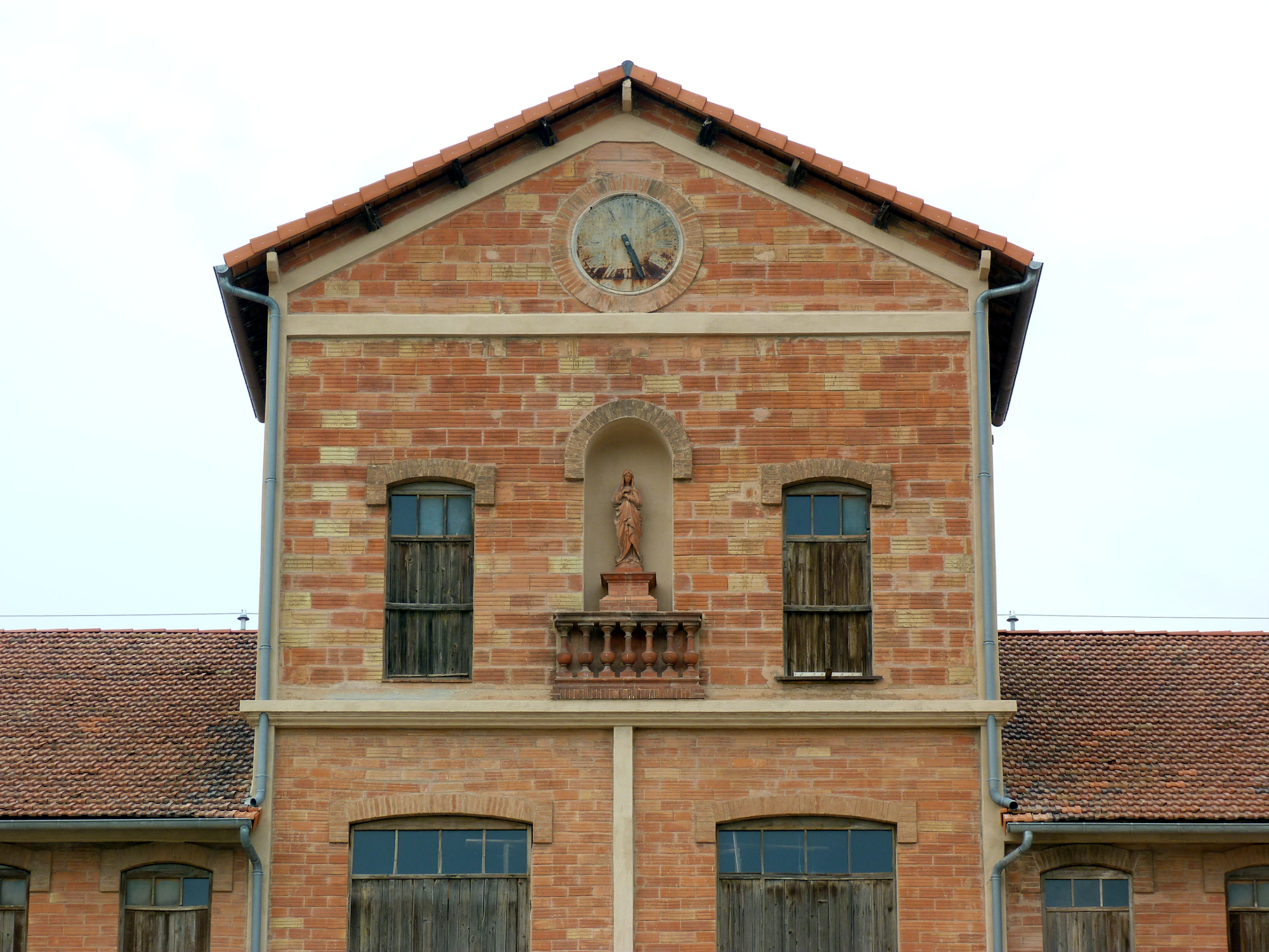 Camp des Milles, Marseille